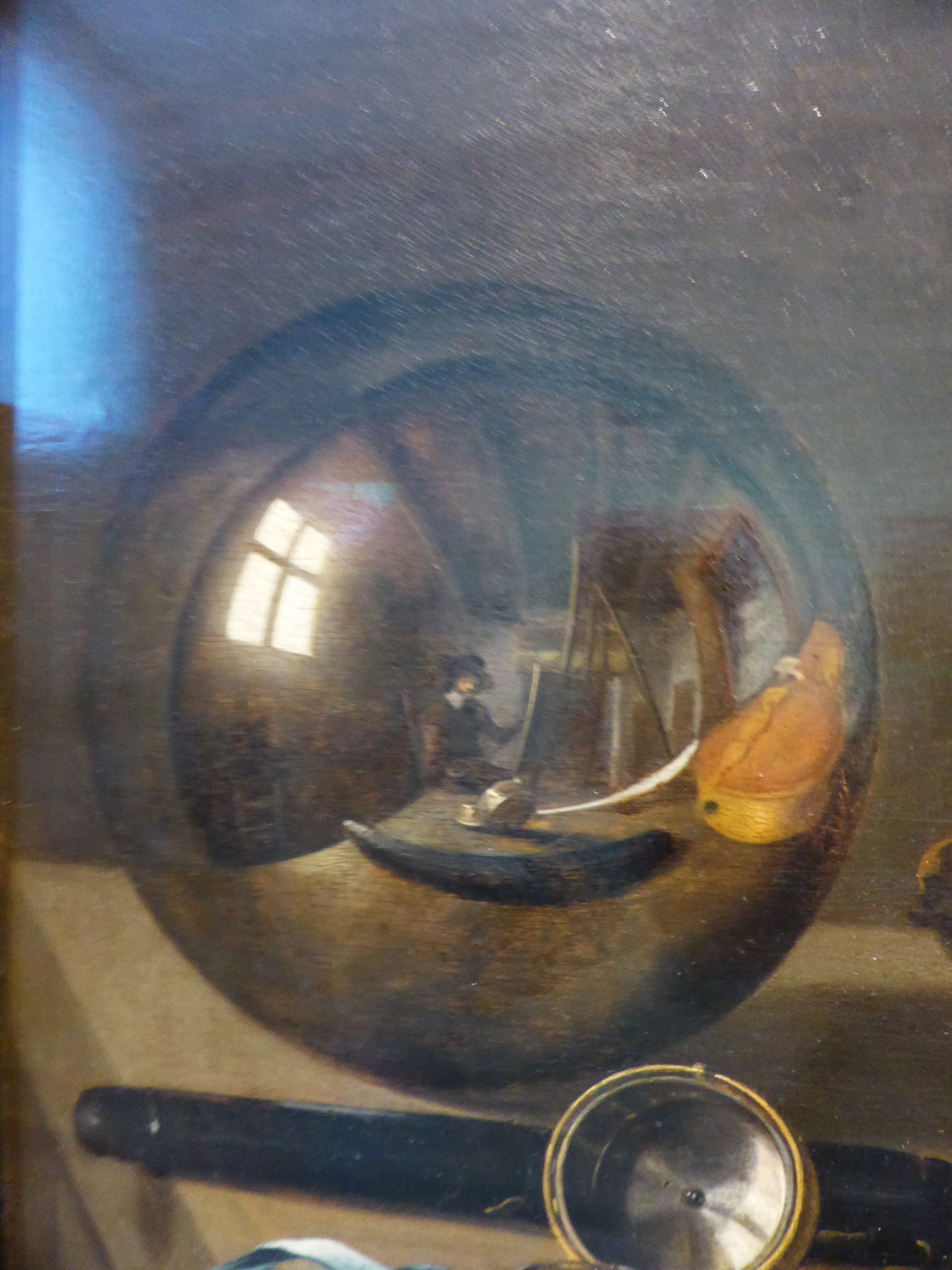 Auf der Tischplatte eines schräg ins Bild ragenden Holztisches vor dunklem Hintergrund liegen verschiedene Gegenstände. In der Spiegelung in der Glaskugel wird der Raum des Malers gezeigt, in dem dieser vor seiner Staffelei sitzt. In der Mitte des Bildes, liegt eine wegen der der doppelten Randeinlage flämische Geige mit Steckfroschbogen auf einem Bücherstapel. Rechts davon ist ein Totenschädel und ein umgestürzter Römer mit Noppenschaft, daneben eine aufgebrochene Walnuß. Hinter dem Musikinstrument steht eine Öllampe, vorne links liegt eine Uhr mit Schlagwerk. Darum ist ein Tintengefäß, eine Schreibfeder und ein Lederetui gruppiert. Der Schlüssel der Uhr und die Schreibutensilien überragen die Tischkante.